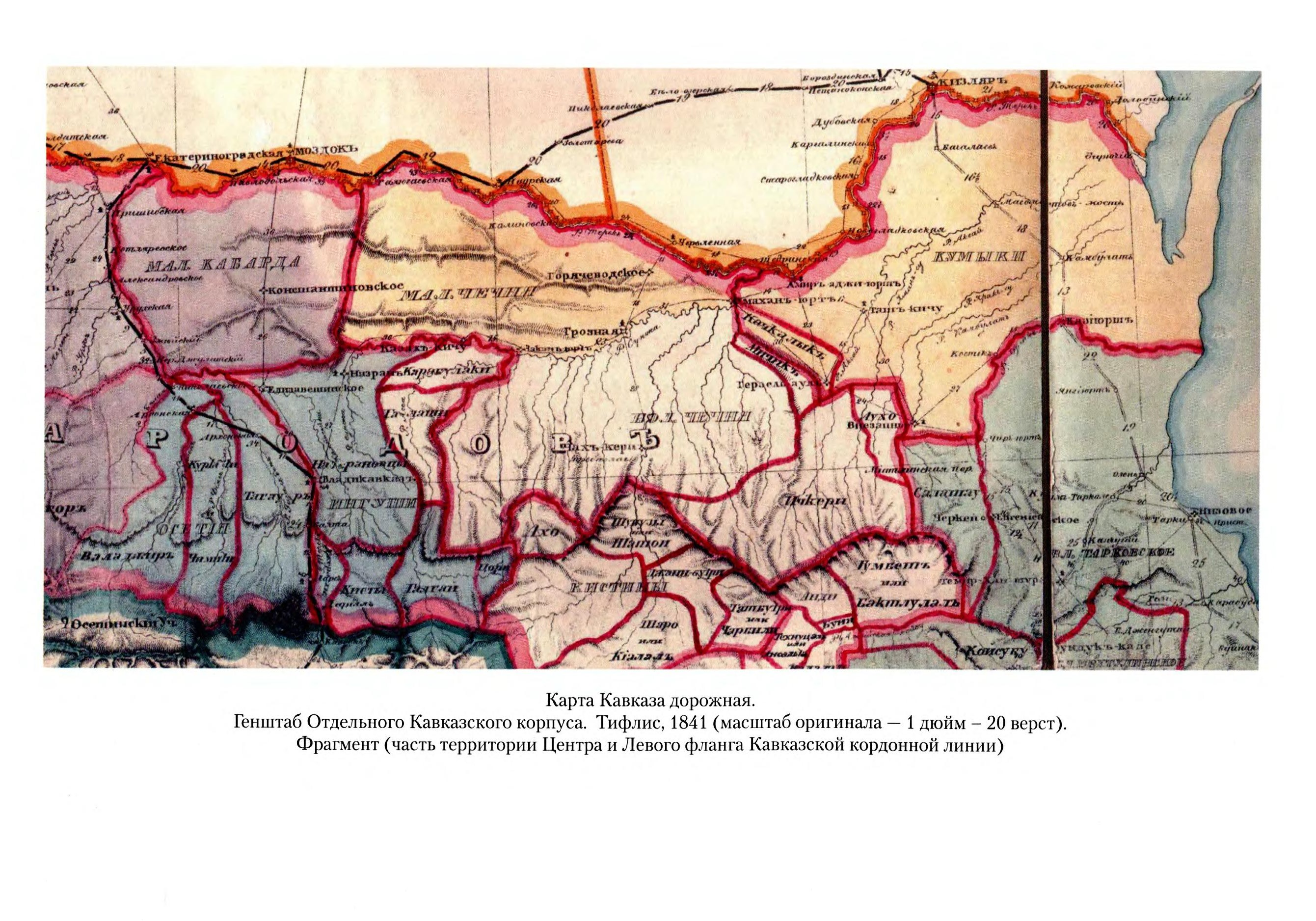 Нохчийн: Карта Восточного Кавказа 1841 год